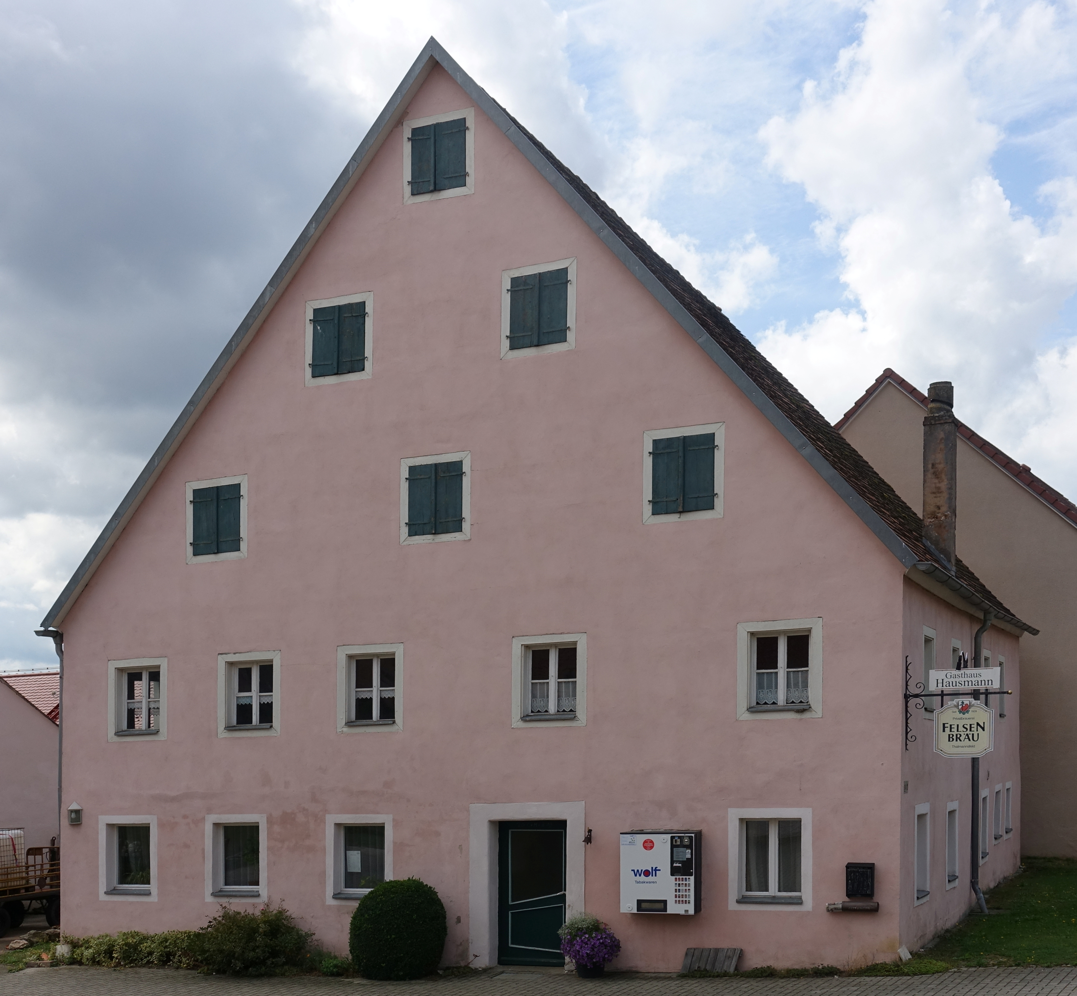 Zweigeschossiger traufständiger Satteldachbau mit Fachwerkgiebel